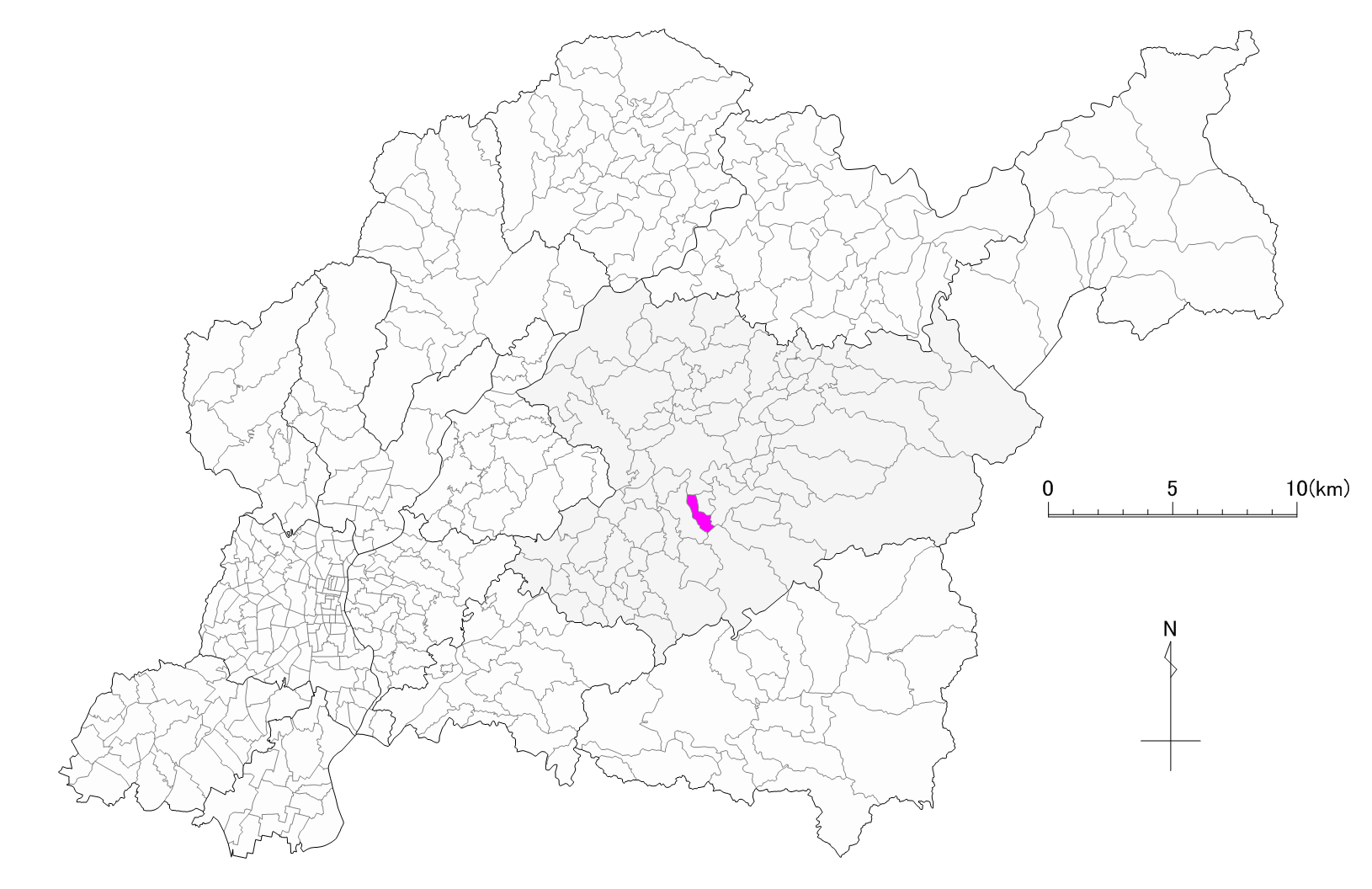 豊田市安実京町位置図